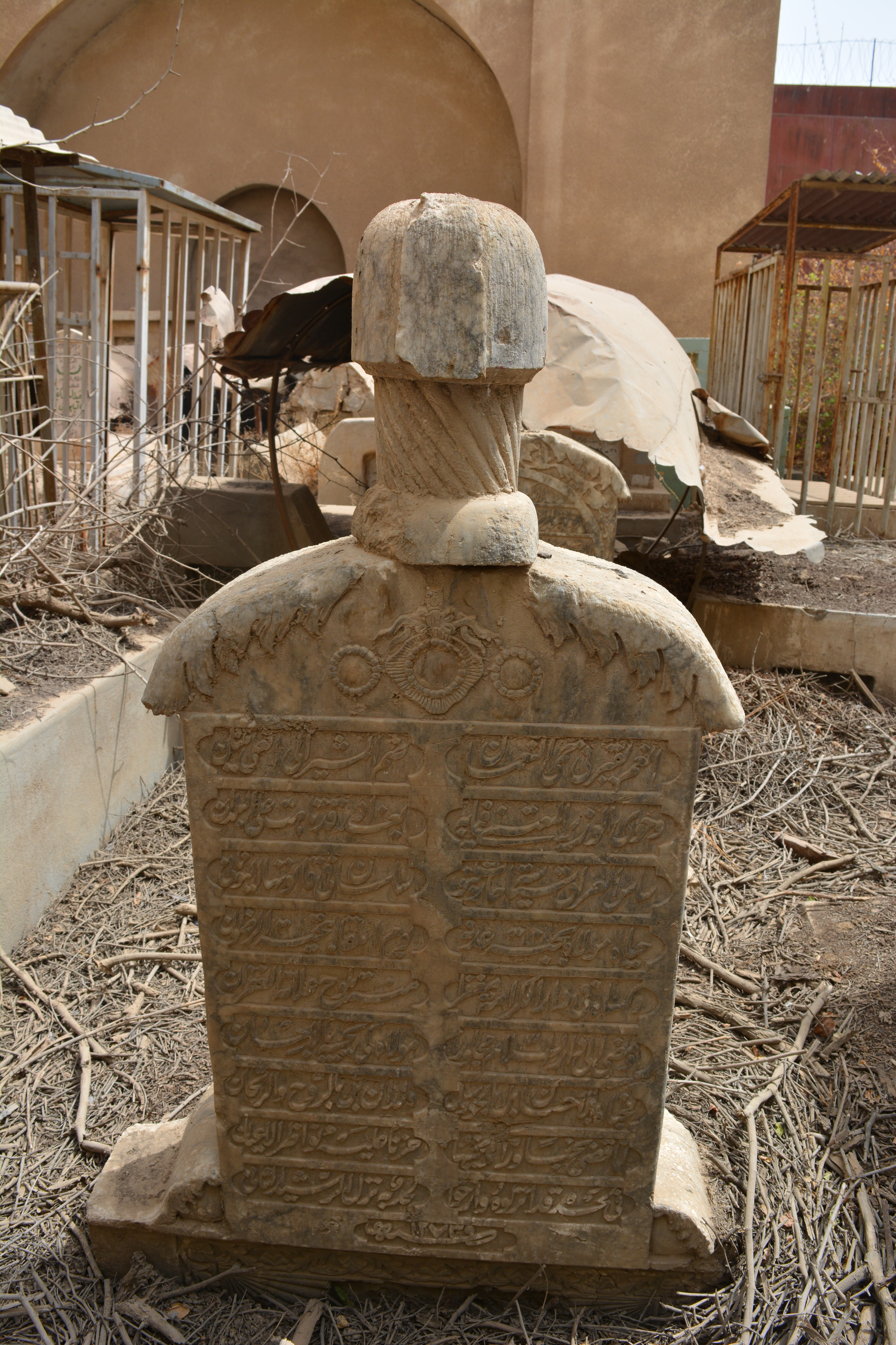 قبر الوالي العثماني رشيد باشا الكوزلكي في مقبرة الخيزران في بغداد